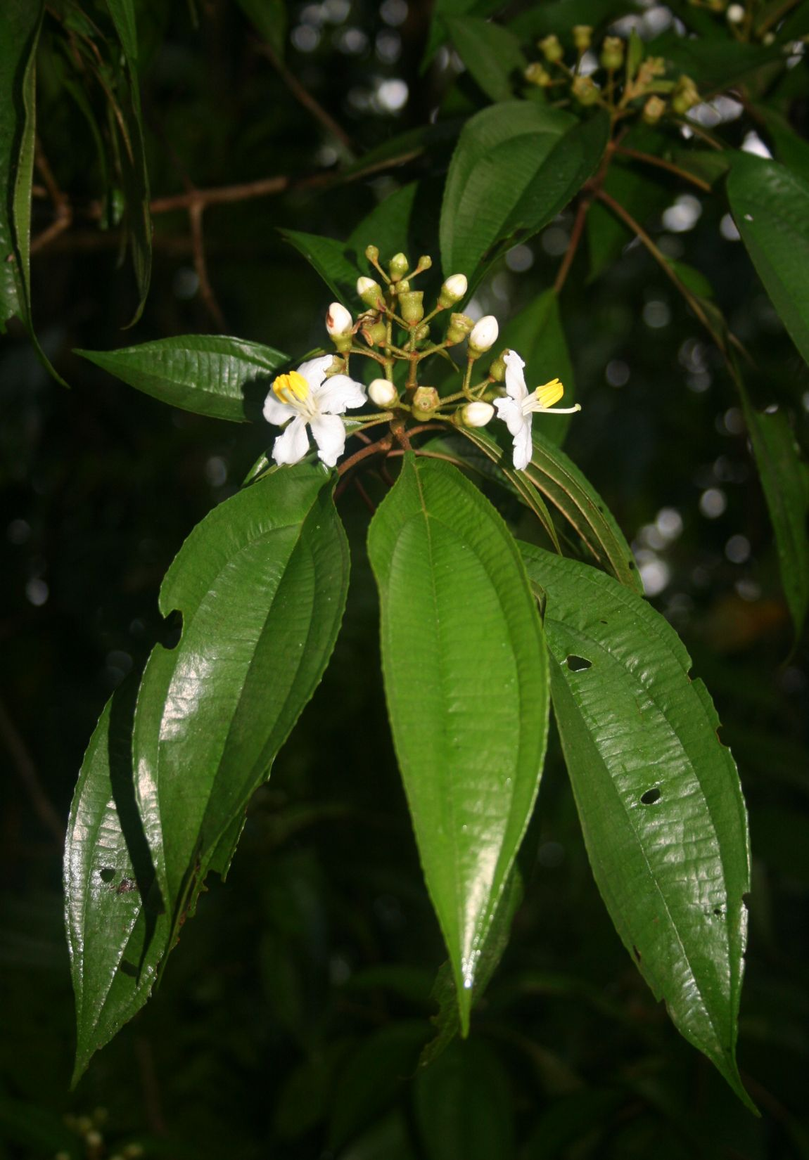 Miconia schlimii, Schwarzmundgewächse (Melastomataceae) - Costa Rica: Prov. Puntarenas, La Gamba NW Golfito, nahe "Tropenstation La Gamba"/"Estación Biológica La Gamba"